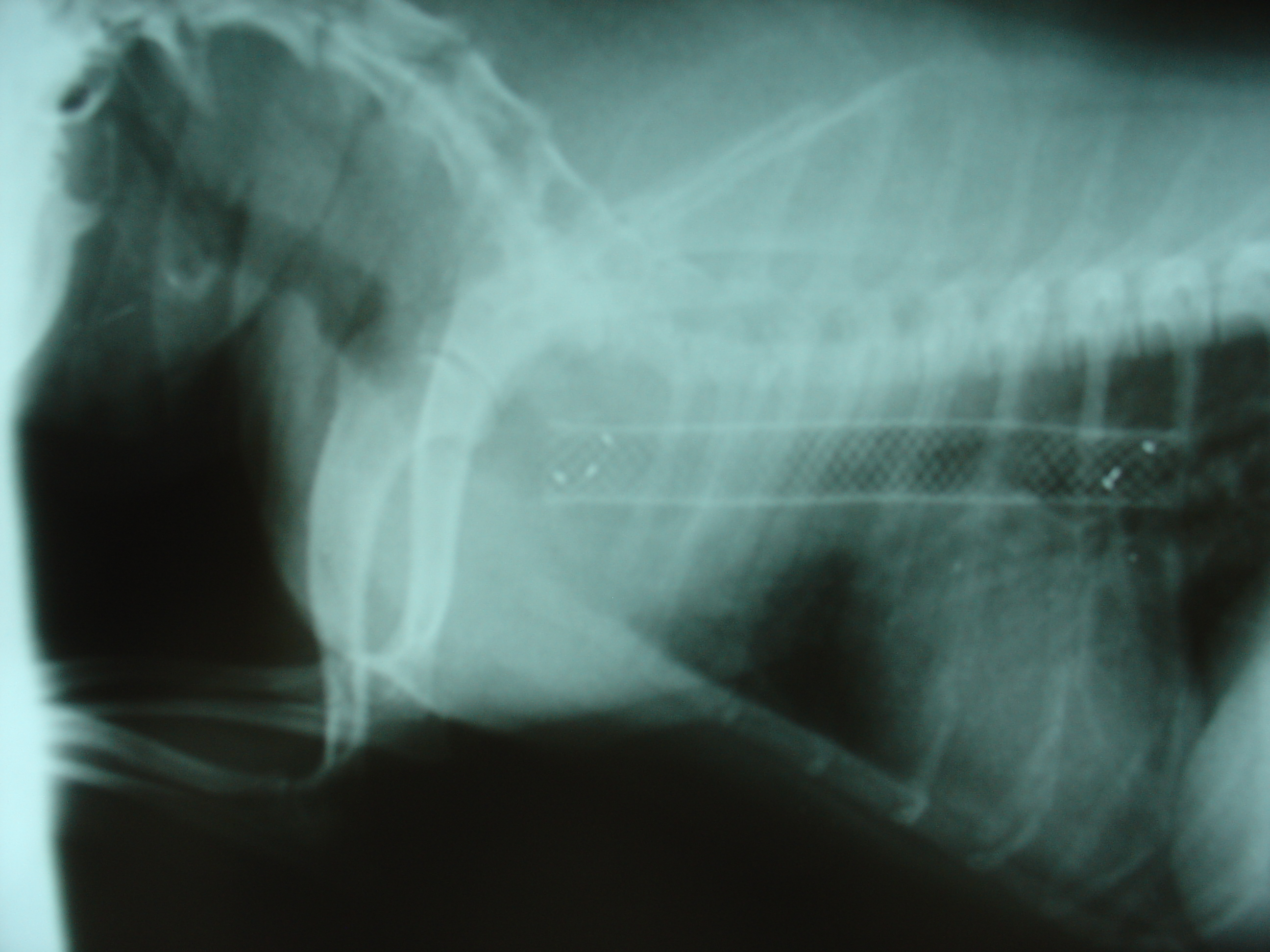 Dieses Bild wurde aus der englischen Wikipedia kopiert. Die dortige Bildbeschreibung lautete